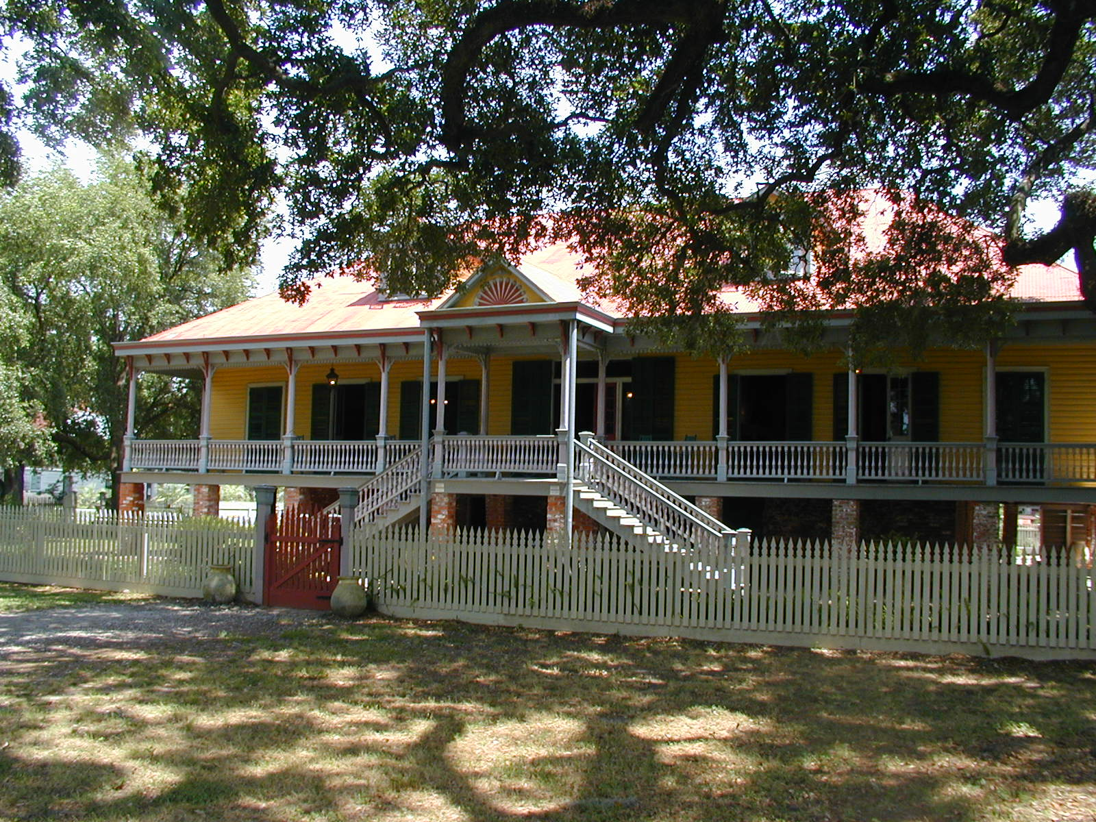 Laura Plantation, Louisiana